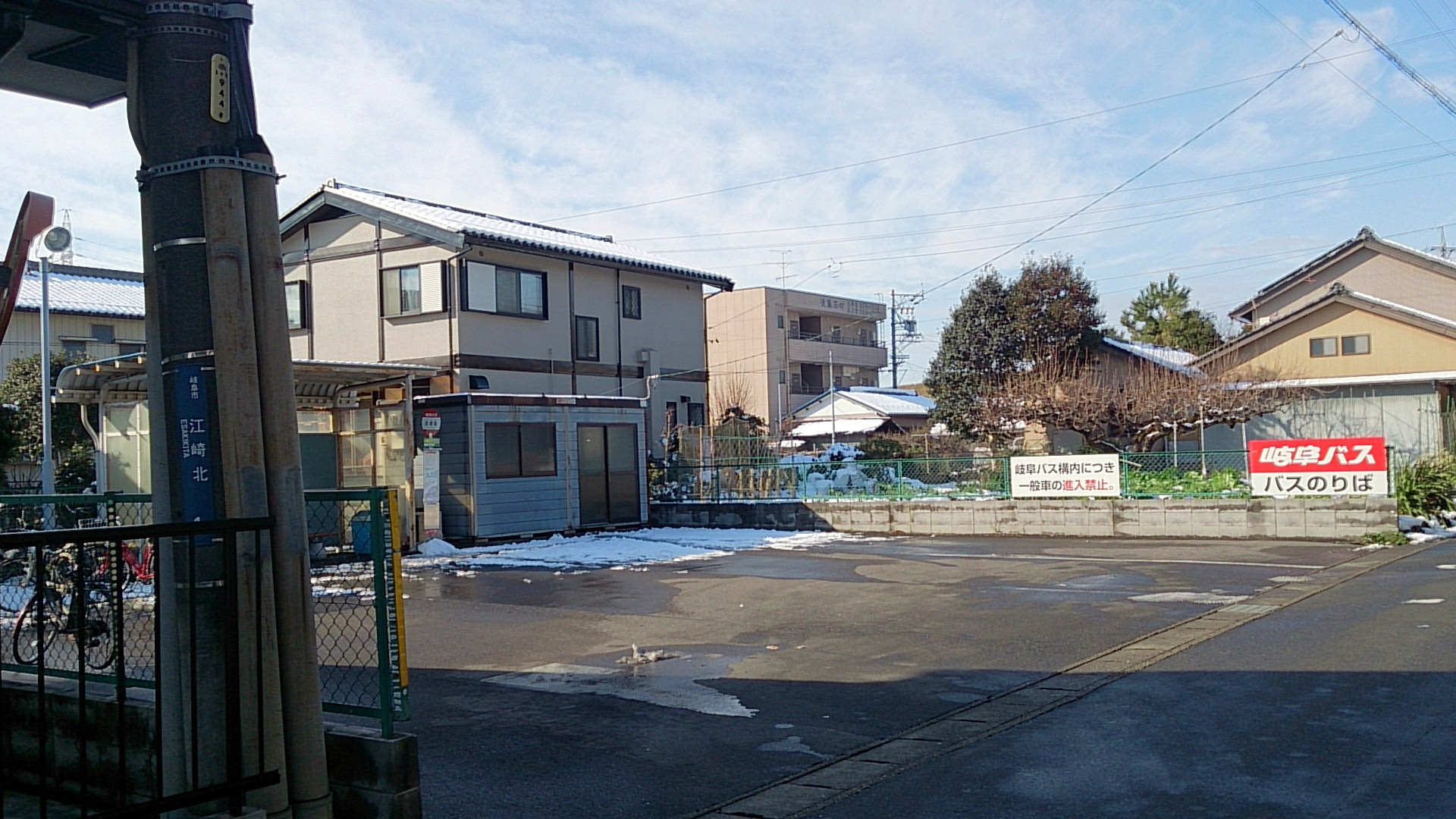 西鏡島～JR・名鉄岐阜～高富のバス路線の西端の停留場である。 1964年までは名鉄鏡島線が移動手段を担っていたが、廃線後はバス運用転換した。 また、道路・宅地開発による区画整理により、鏡島線での痕跡はもはやない。